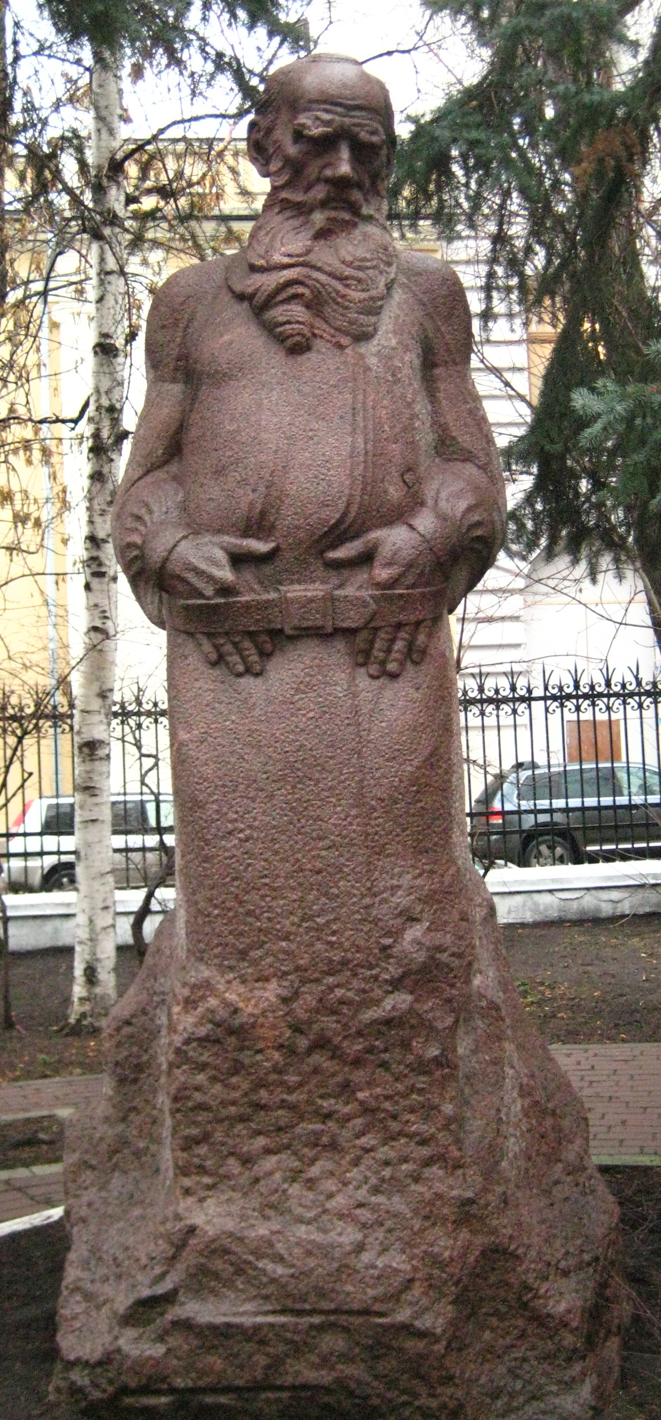 Скульптор С, Меркуров. Статуя, гранит Л. Н. Толстого, 1913 год. В 1972 году установлена у здания музея Толстого на Пречистенке в Москве.